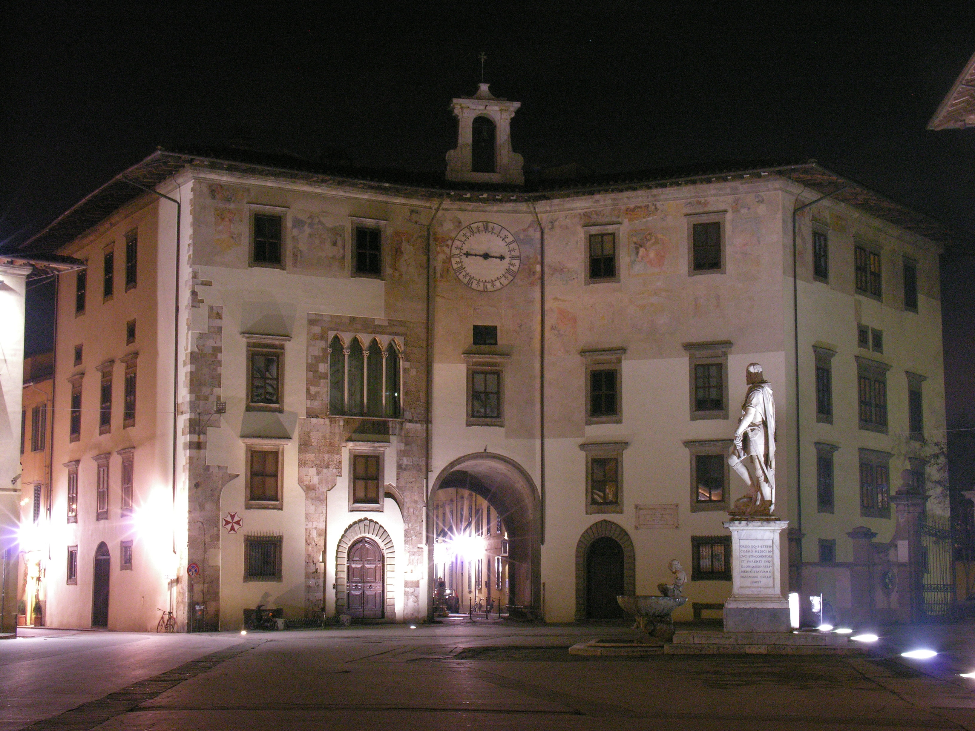 Palazzo dell'Orologio by Night - Piazza dei Cavalieri - Pisa -Italy